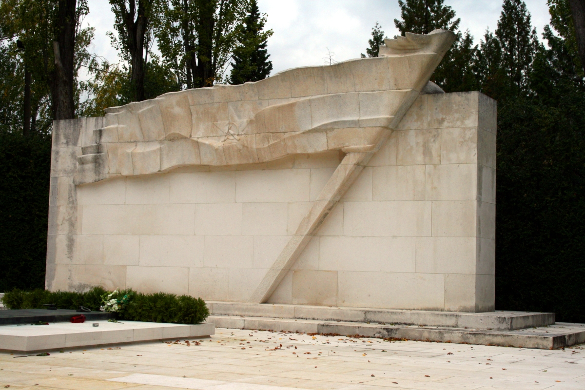 Grobnica narodnih heroja na Mirogoju, Zagreb, Hrvatska